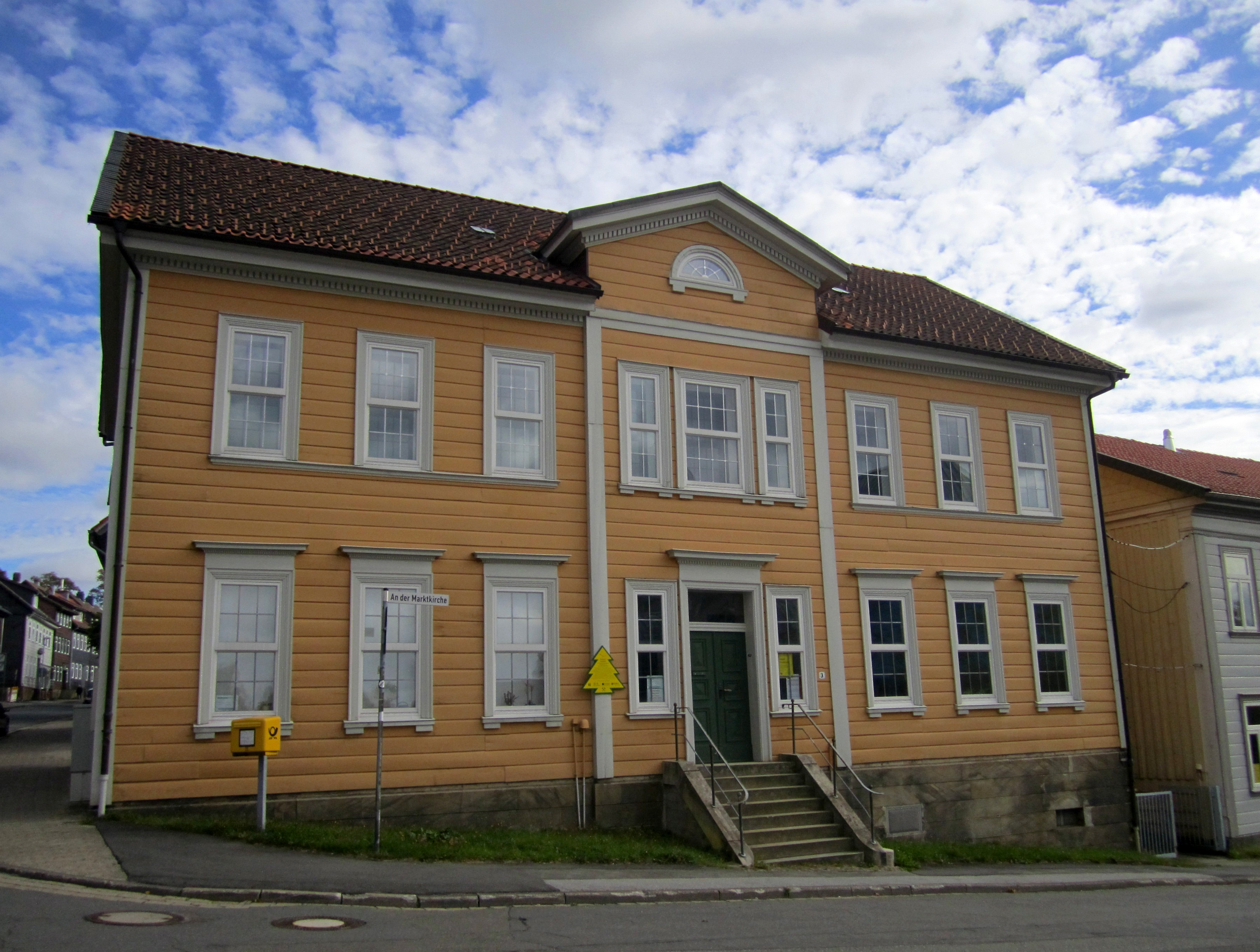 Haus des Generalsuperintendenten in Clausthal, Gemeinde Clausthal-Zellerfeld, Niedersachsen, Deutschland.